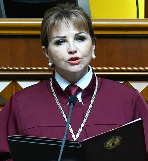 Шаптала Наталья Константиновна